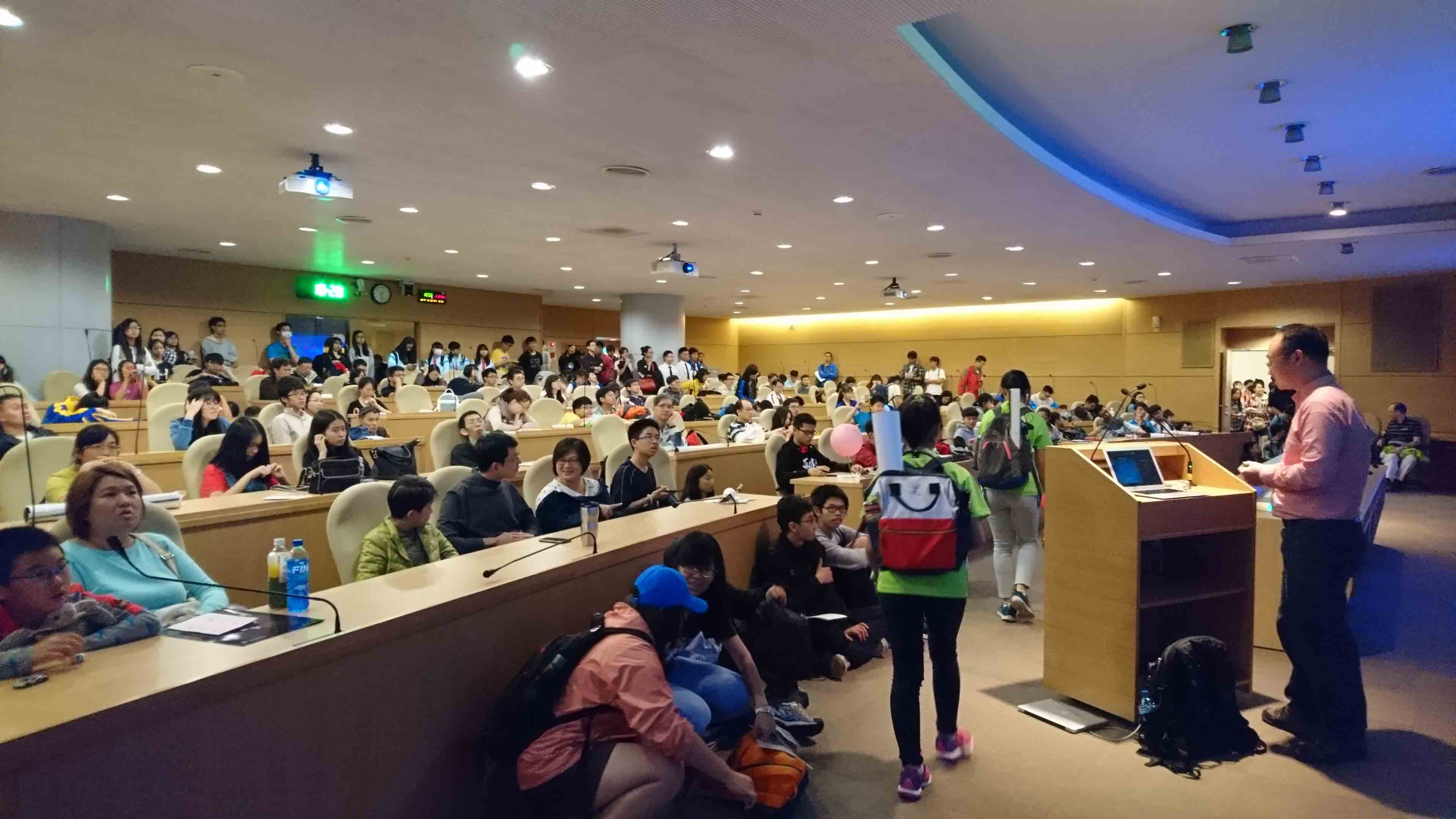 ASIAA astronomer Ken Chen was about to give a talk at the 2017 Open House